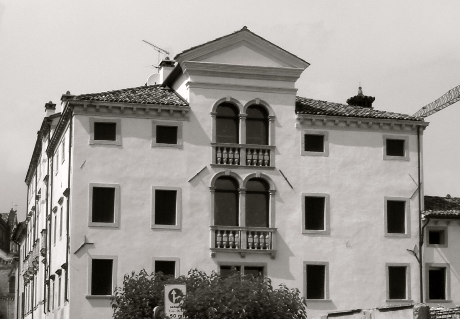 Pieve di Soligo: Villa GhettiSony Cyber-shot DSC-T7